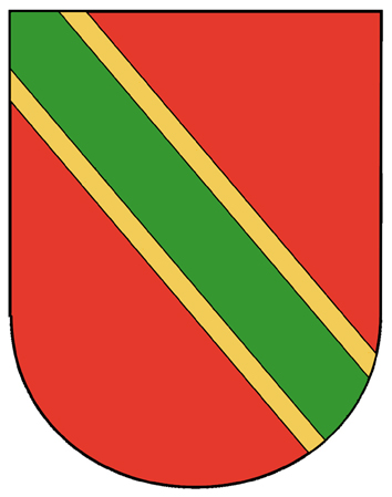 Escudo de Álvar Fáñez según Argote de Molina